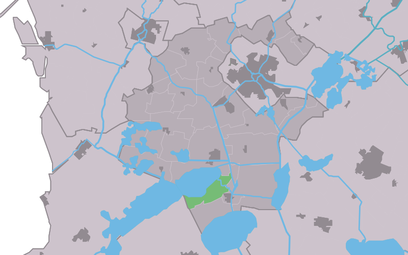 Kaartsje fan himrik fan Yndyk